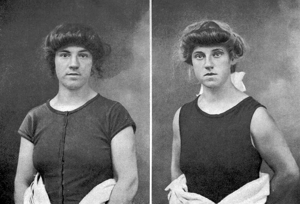 Les soeurs suisses Marthe (G.) et Cécile (D.) Robert, nageuses de grand fond (1906).